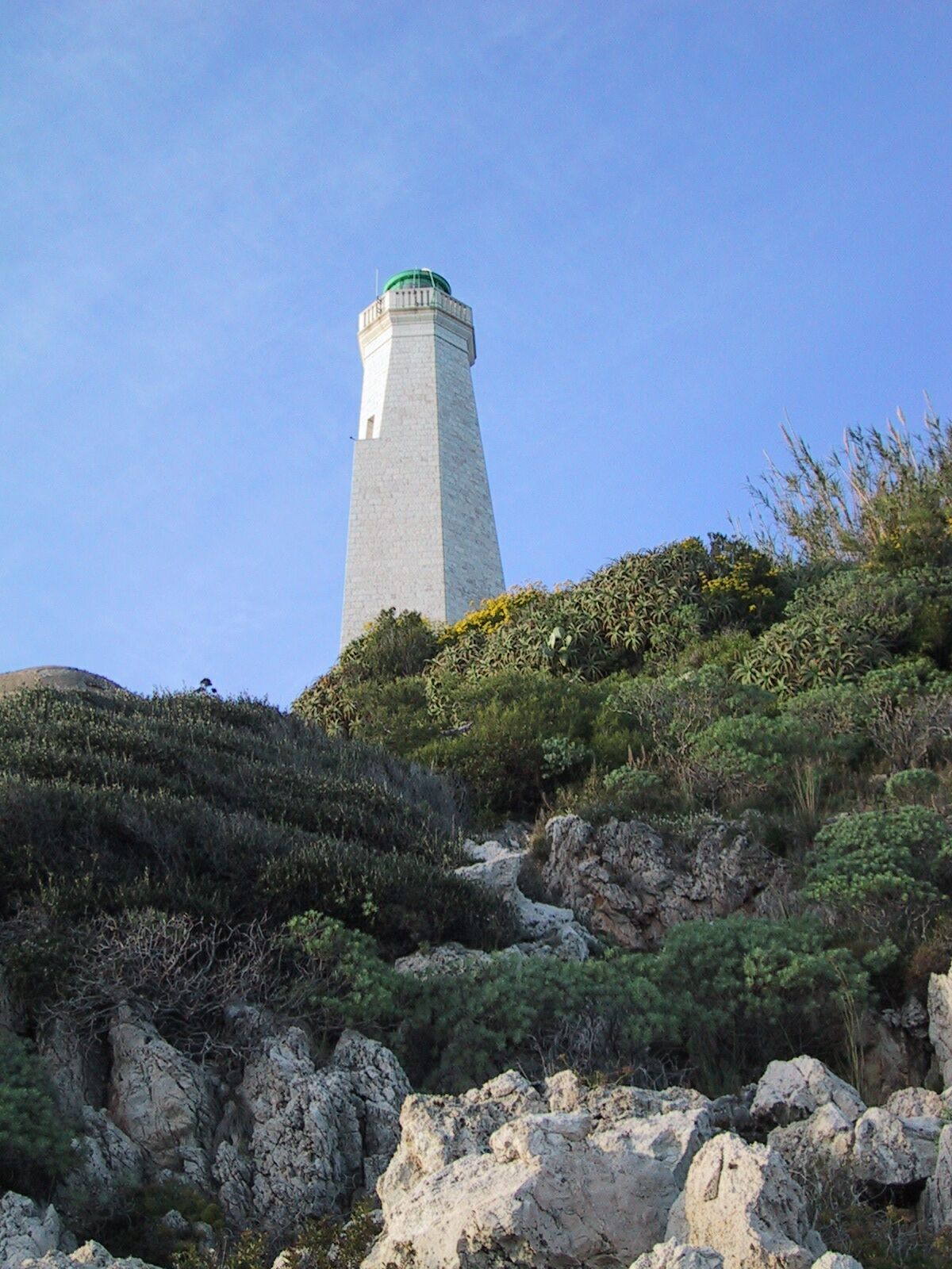 Le phare de Saint-Jean-Cap-Ferrat.